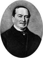 Portraitaufnahme